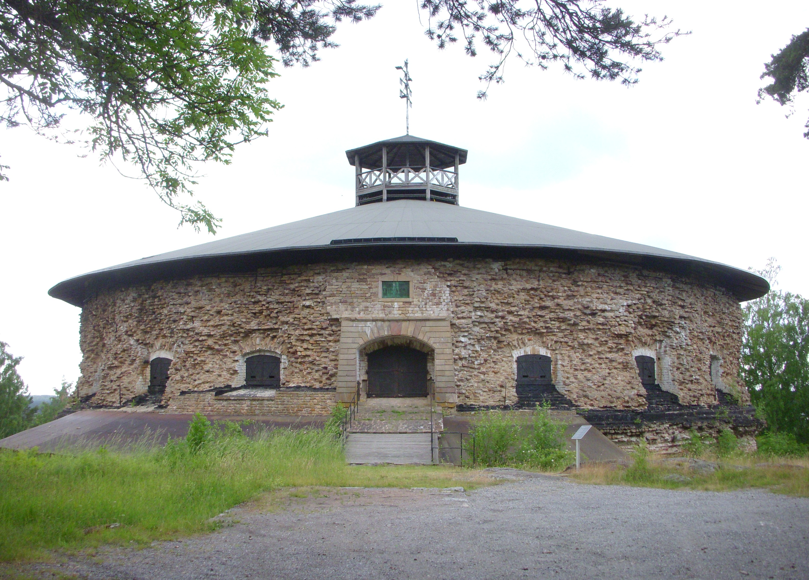 Fredriksborgs fästning i Värmdö kommun